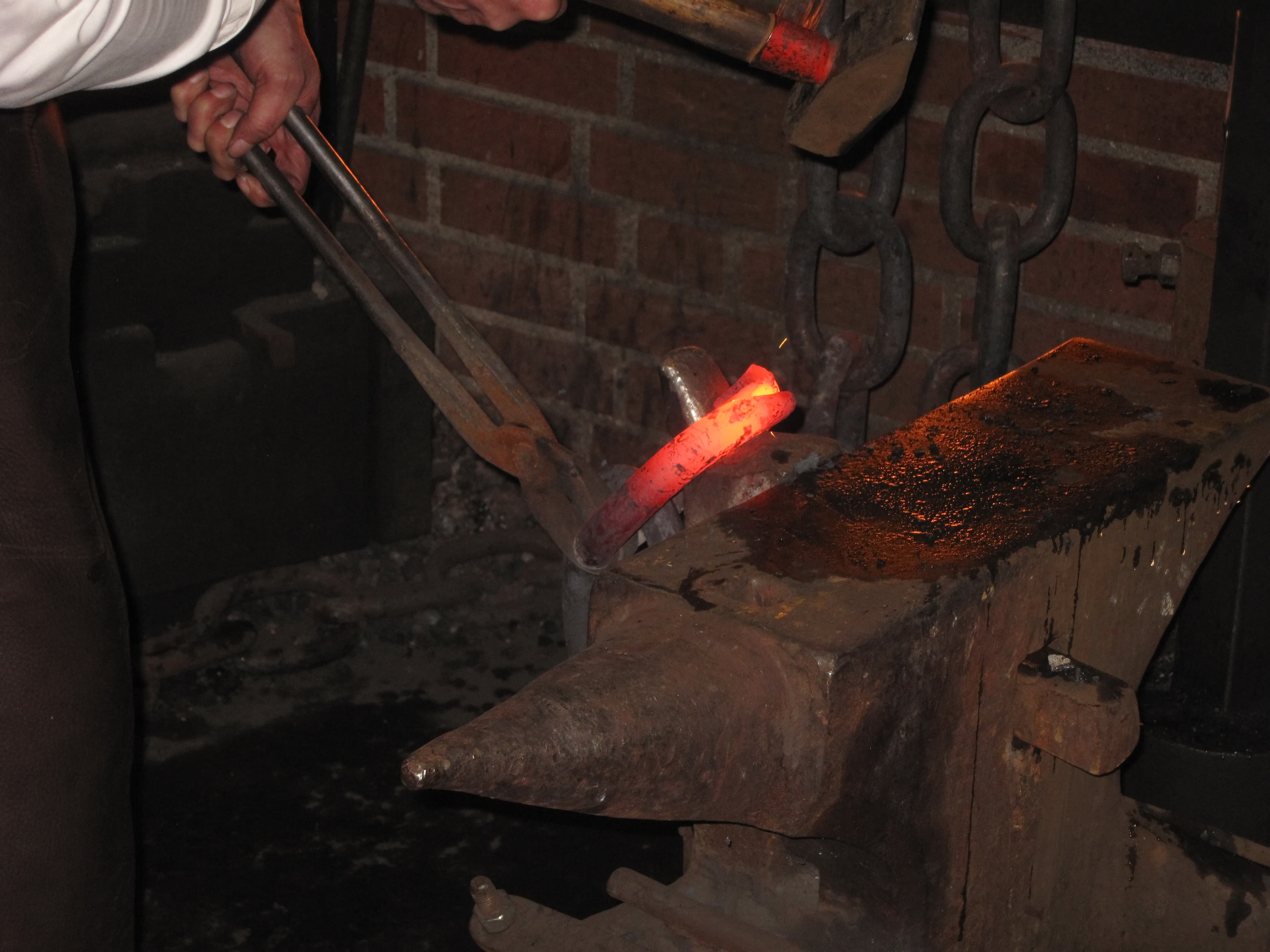 Schmieden eines Kettengliedes im Kettenschmiedemuseum Fröndenberg, Ruhrstraße 12 in Fröndenberg/Ruhr.